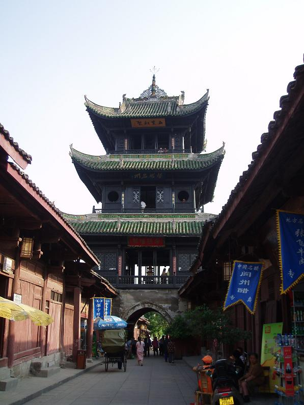 by caobo 自由使用。FREE